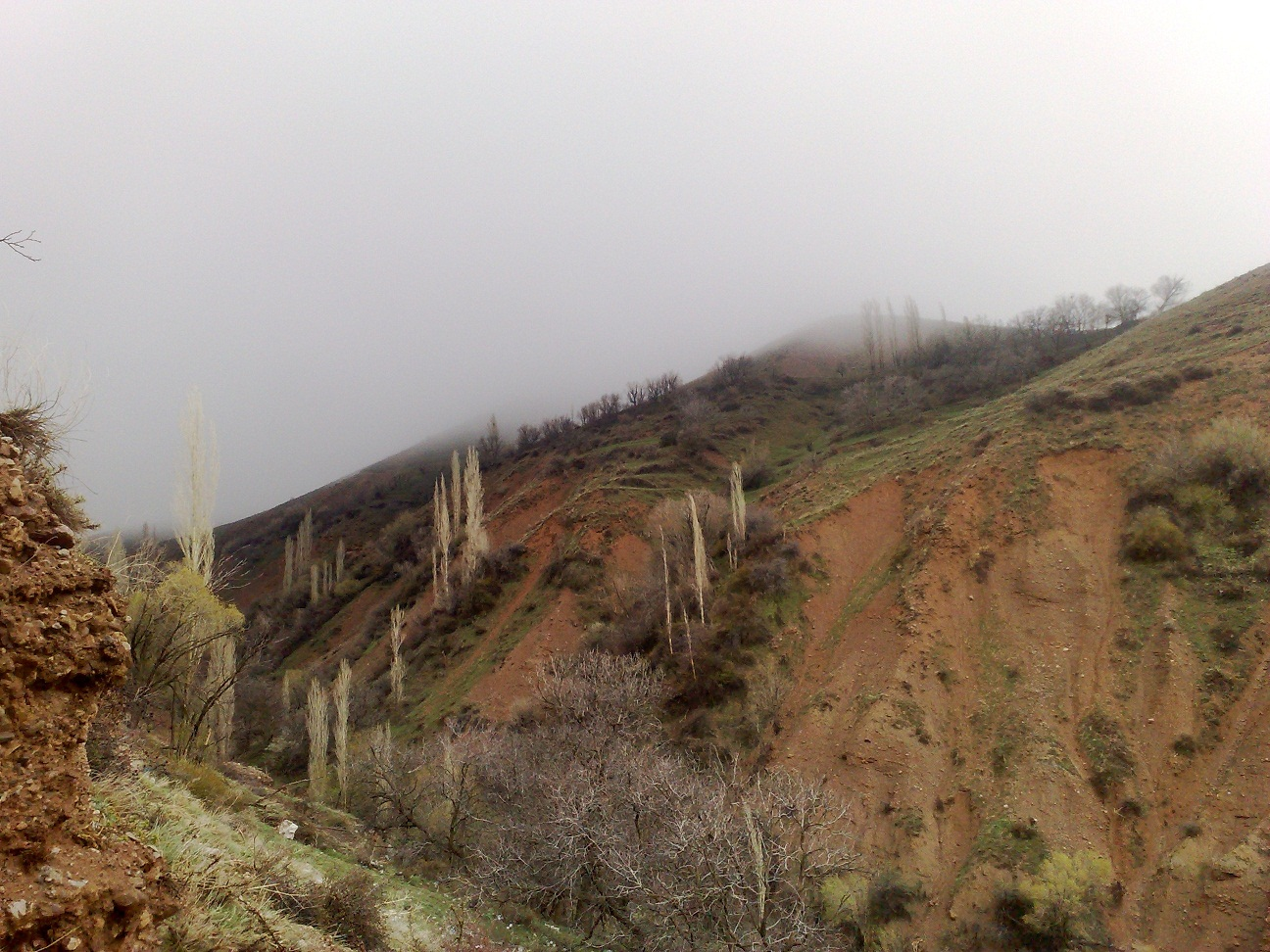 منظره از دره ای لو